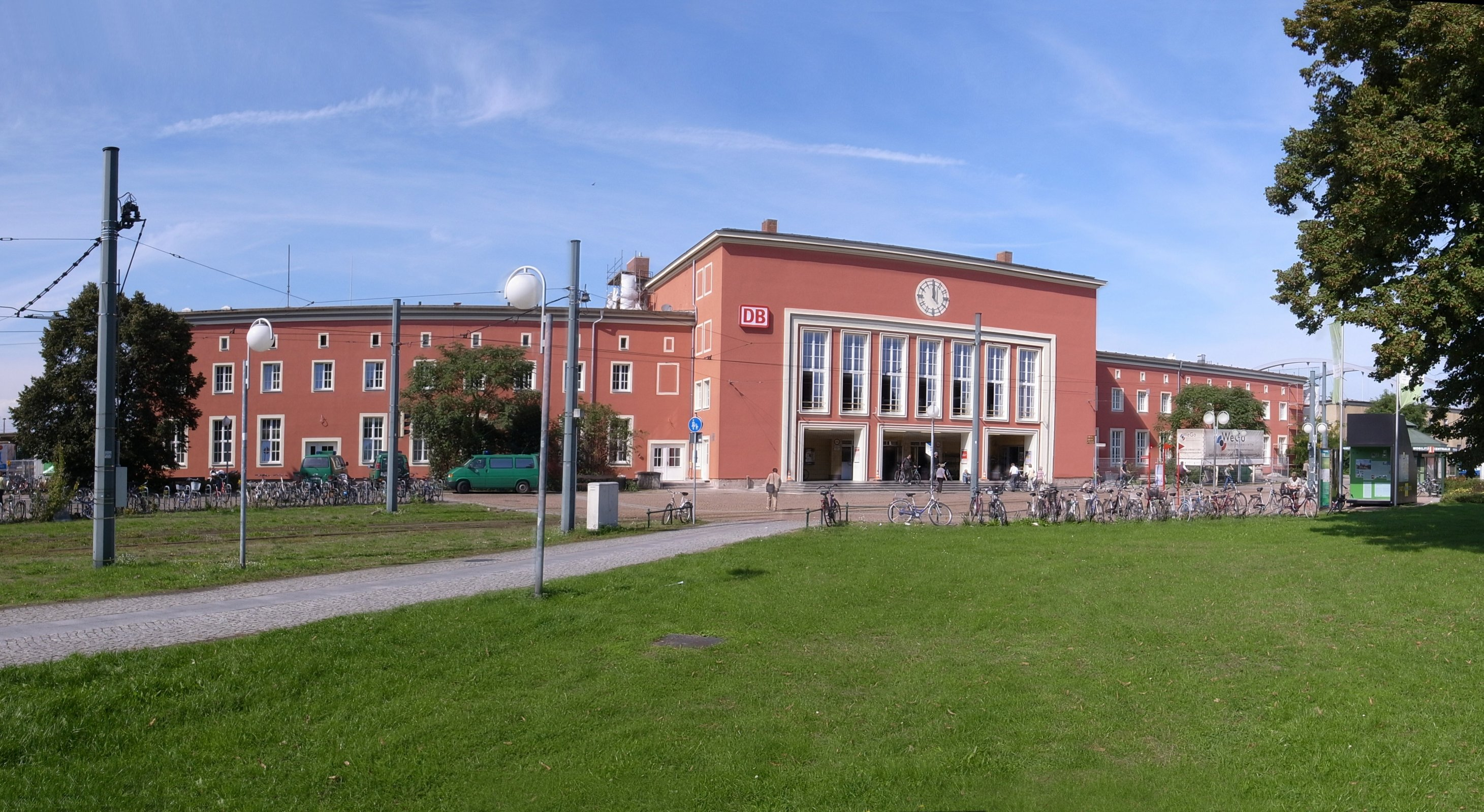 Dessau,Hauptbahnhof 2010